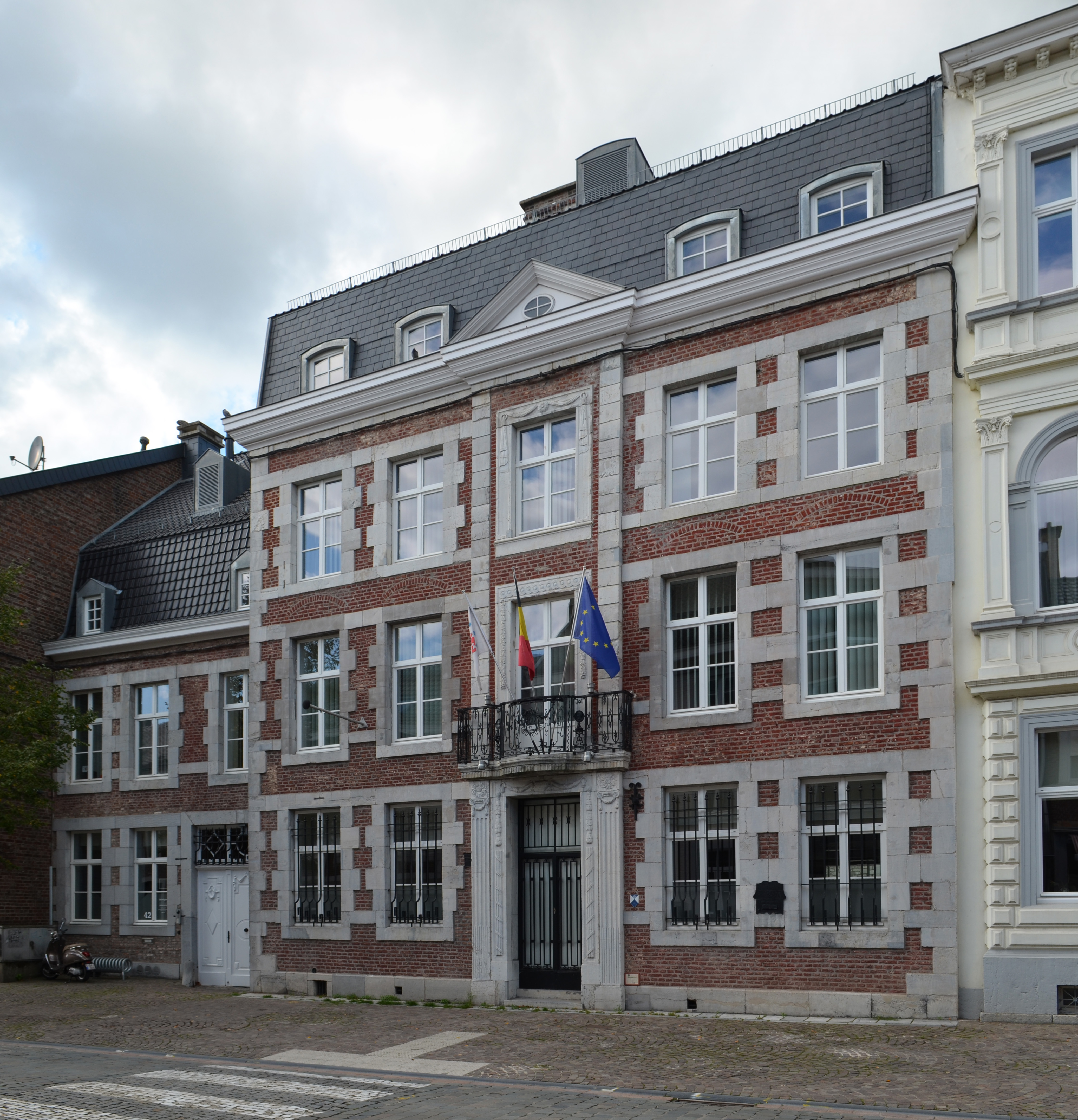 Eupen, Gospert 40-42, Straßenfront